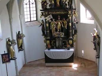 interier